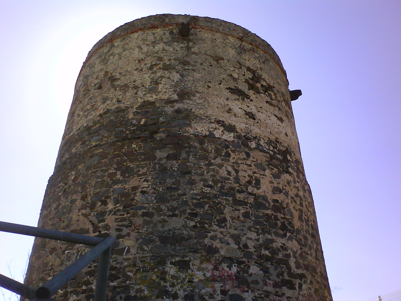 Torre Vigía de El Catalan. Lepe (Huelva)